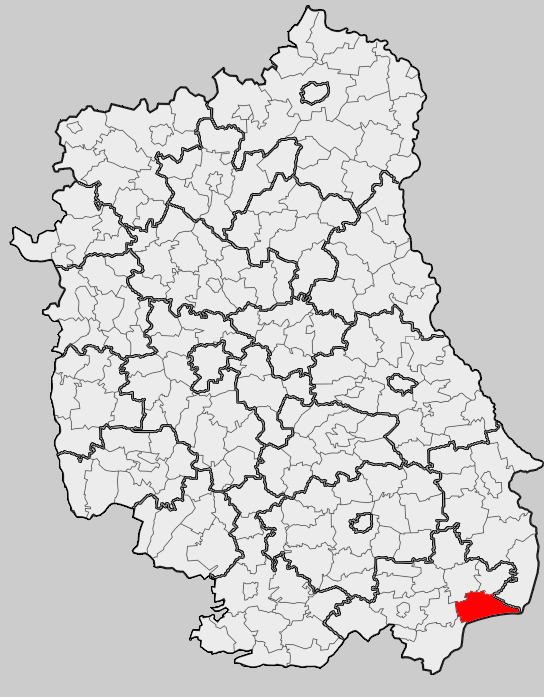 Map of gmina Ulhówek, Tomaszów Lubelski county, Lublin voivodship Mapa gminy Ulhówek, powiat tomaszowski, województwo lubelskie